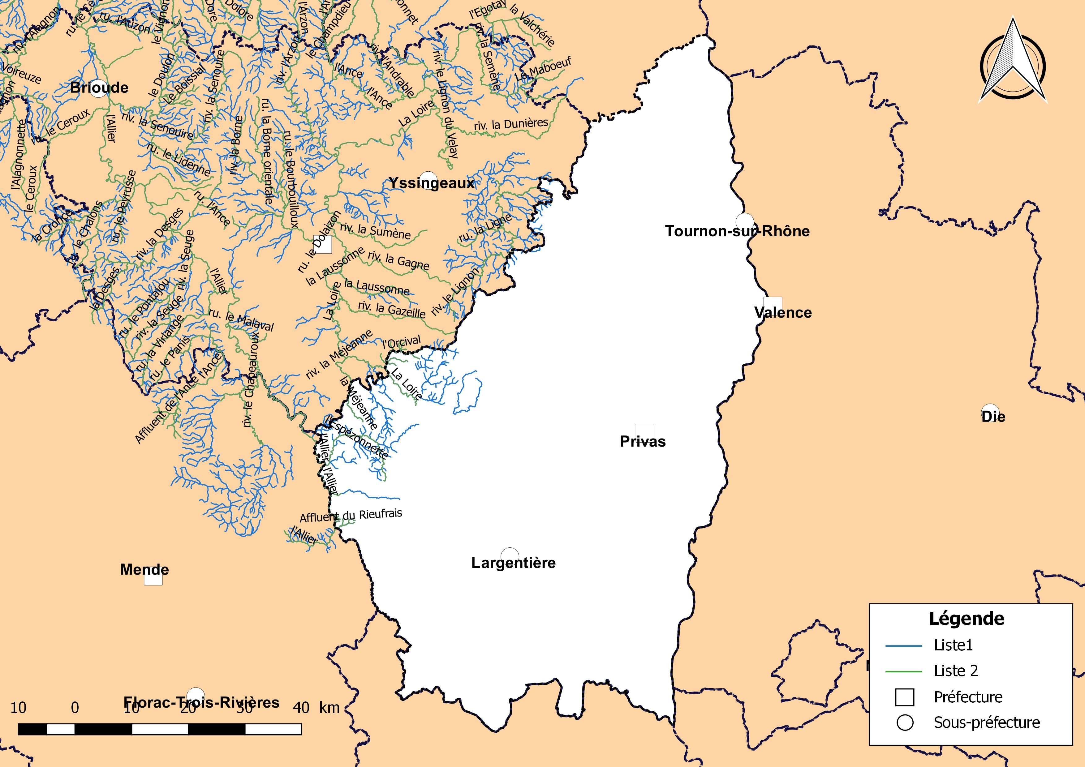 Classement des cours d'eau du département de l'Ardèche (France) au titre de la continuité écologique (article L214.17 I du Code de l'environnement).